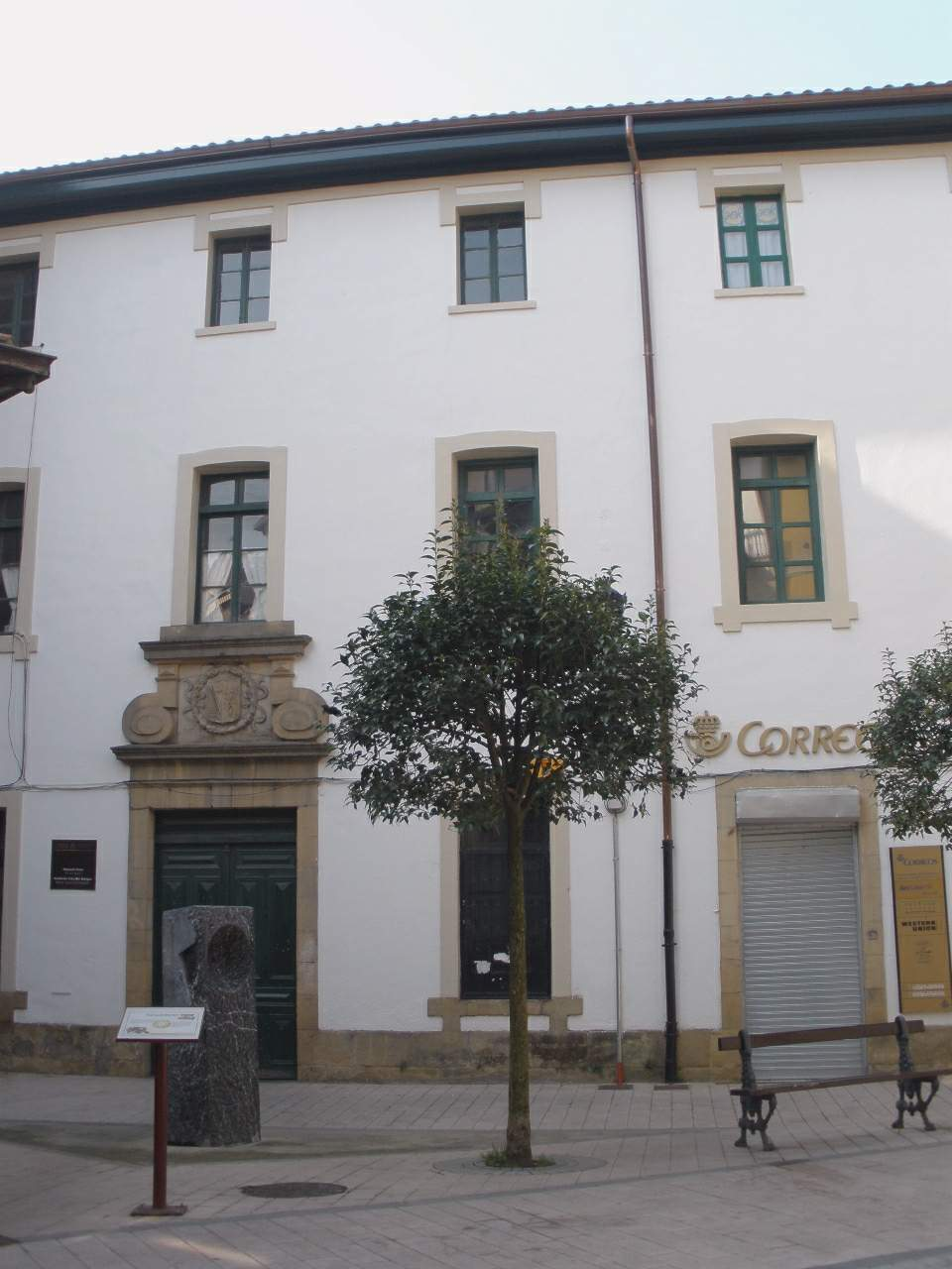 Ordizia - Casa Torre de Muxika